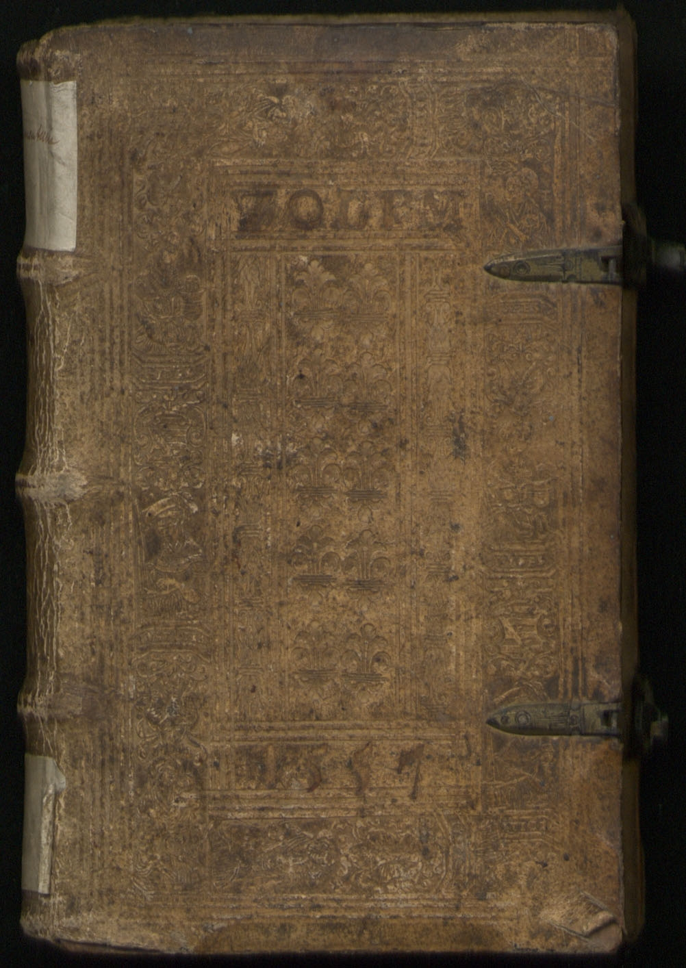 Einband (vorne) von: "Biblia graeca. - Της καινής Διαθήκης άπαντα. - Novum Iesu Christi Testamentum, Graece. Basel, N. Brylinger, 1553. (17,5:11,5 cm). 719 S. Blindgepr. Schweinsldr. d. Zt. über Holzdeckel mit zwei Schließen, Vorderdeckel mit Monogramm "Z O L P M" u. Datierung 1557; gebräunt u. etwas angestaubt, untere Ecken bestoßen." Buch aus der Bibliothek des Zacharias Orth in der Gymnasialbibliothek Stralsund, versteigert bei Reiss & Sohn, Auktion 154 Nr. 986